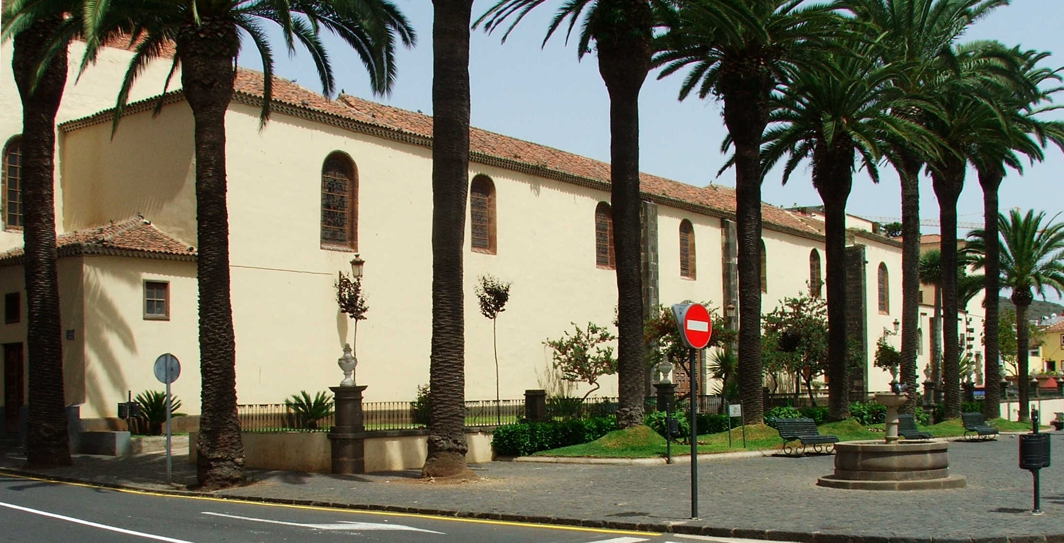 Iglesia de la Concepción La Laguna